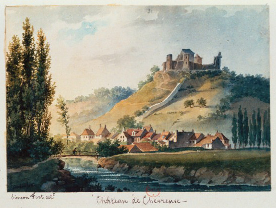 Château de Chevreuse - Dessin de Fort, Jean-Antoine-Siméon (1793-1861)